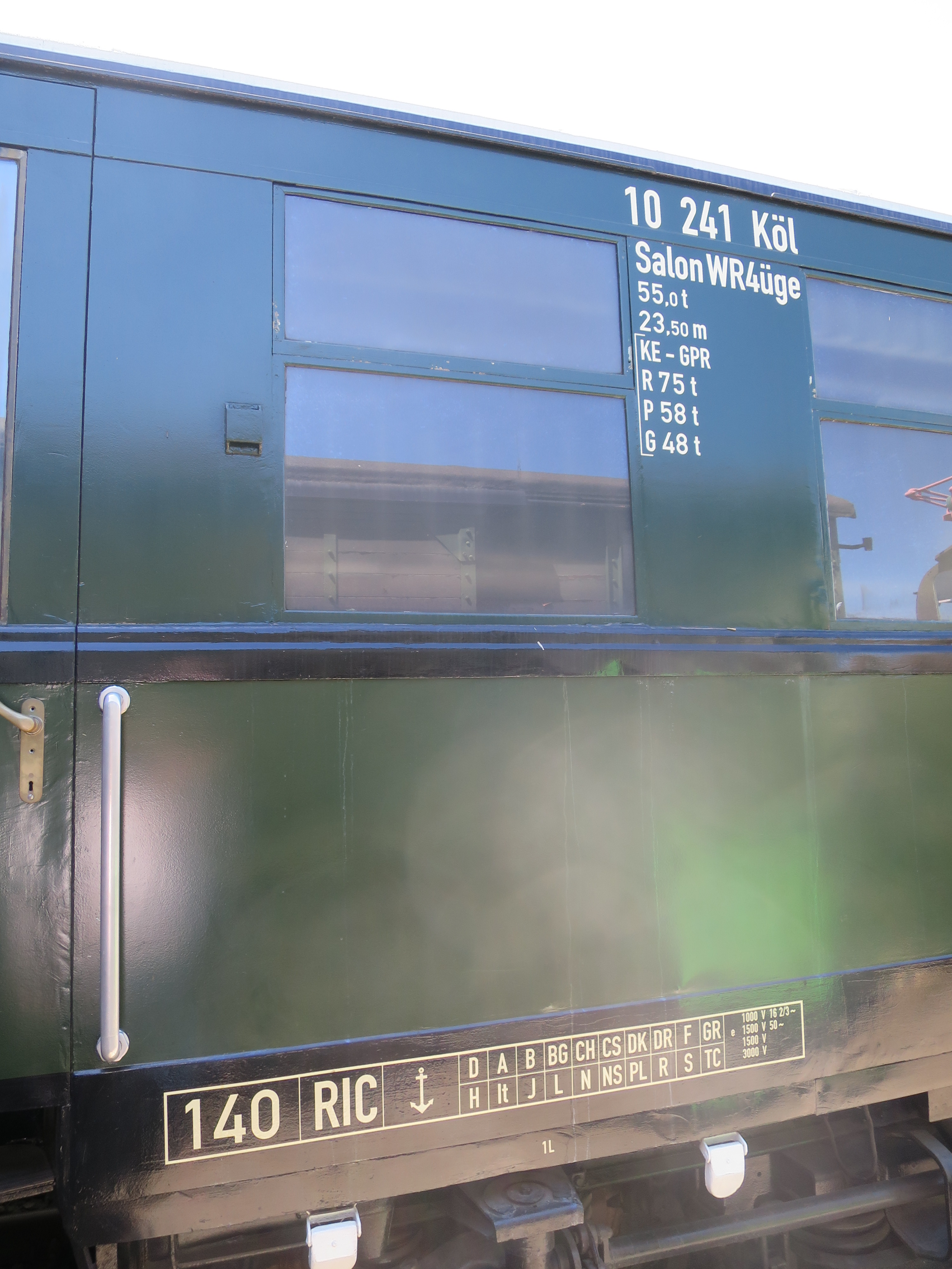 Salonspeisewagen des Sonderzuges von Hermann Göring 10 241 Bln: heutige (museale) Beschriftung